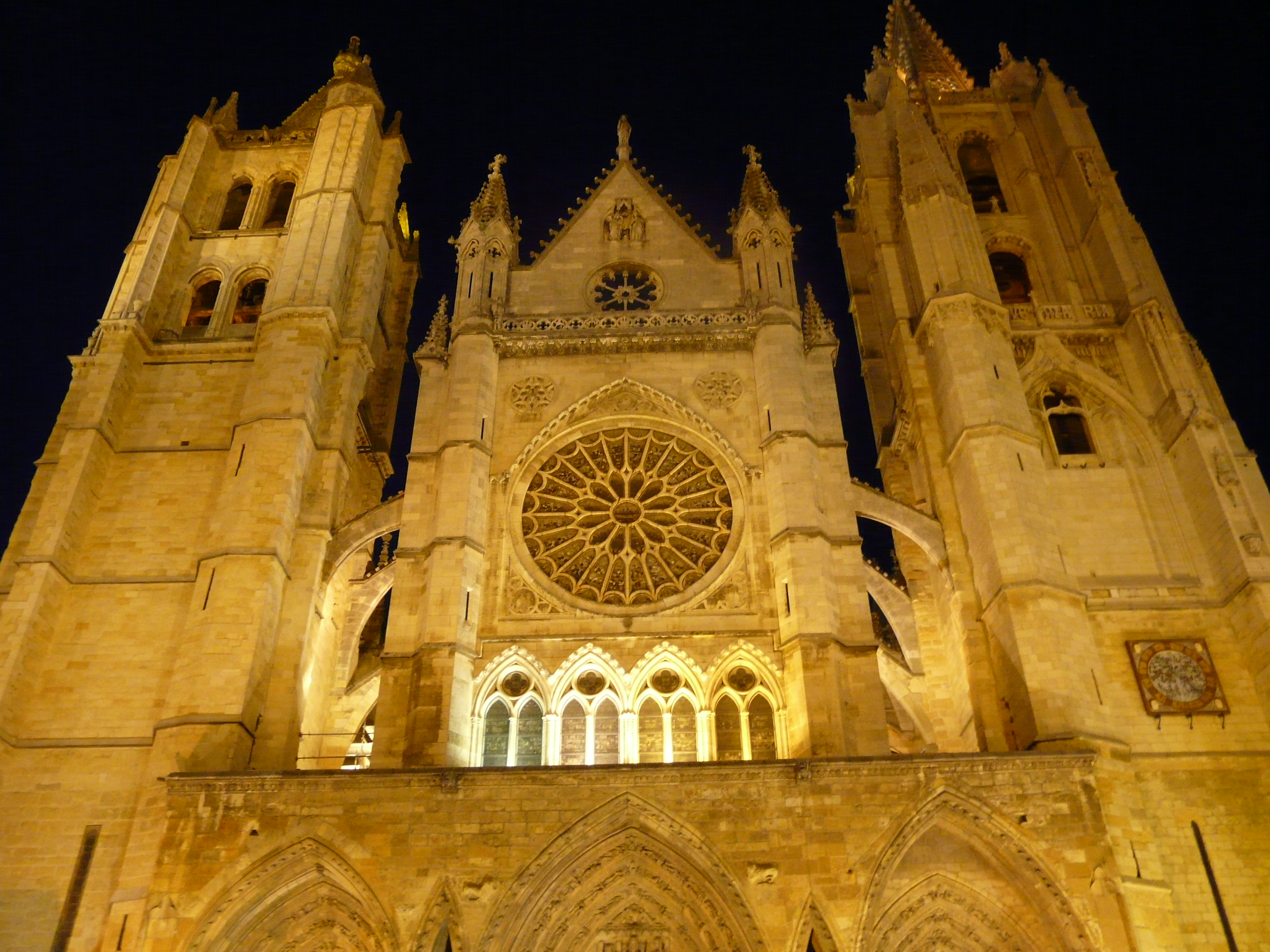 Fachada occidental Catedral de León